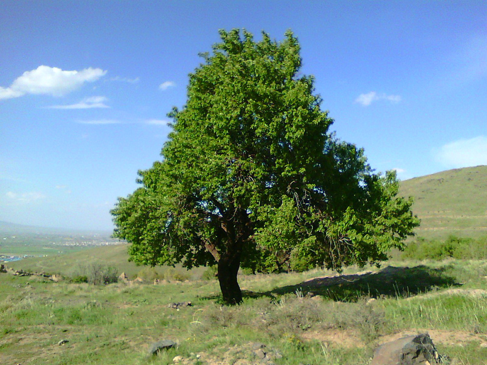 درخت کهن‌سال زردآلو. کوهستان الوند. ایران